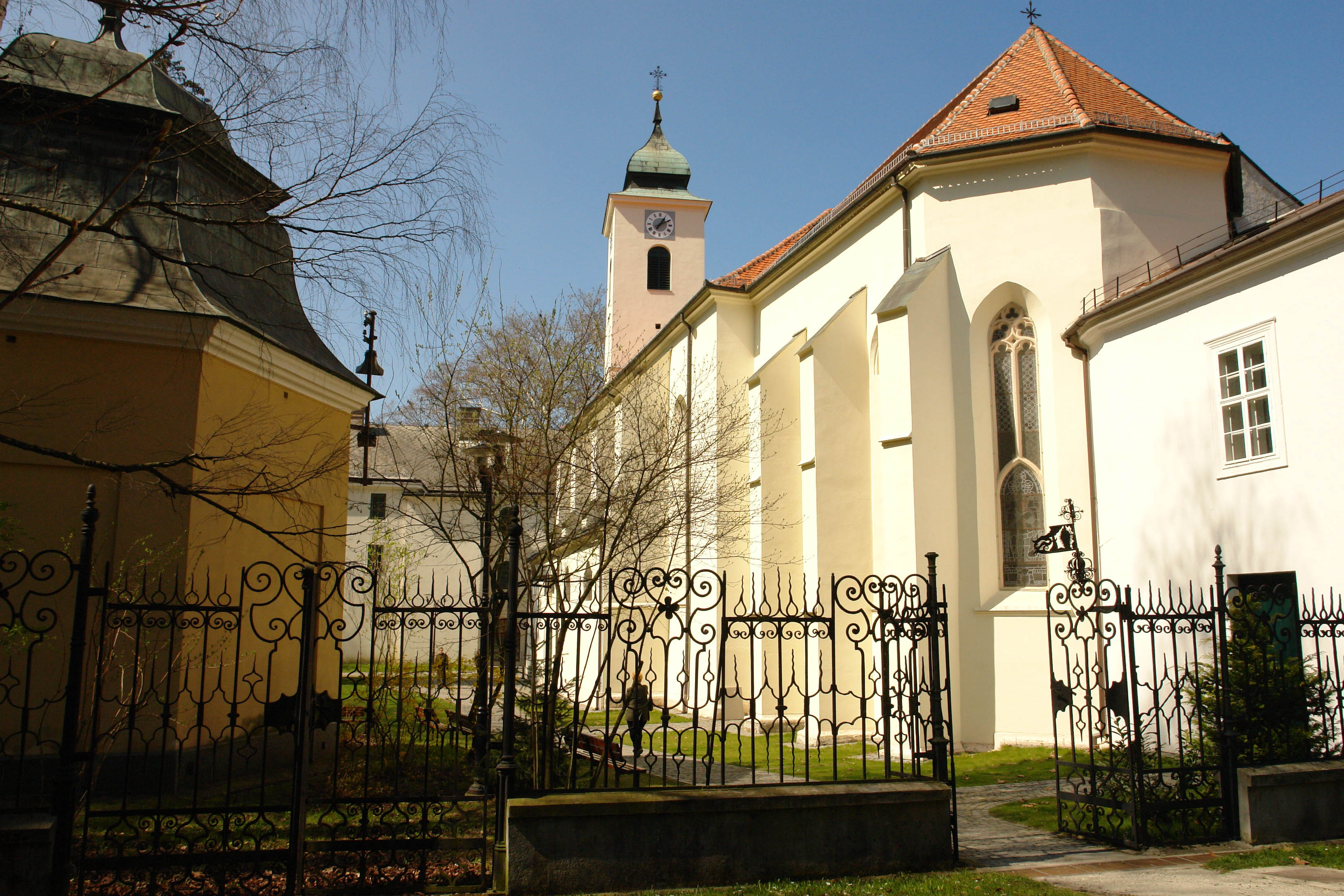 Máriavölgy (Marianka) kolostor templom, zarándokhely